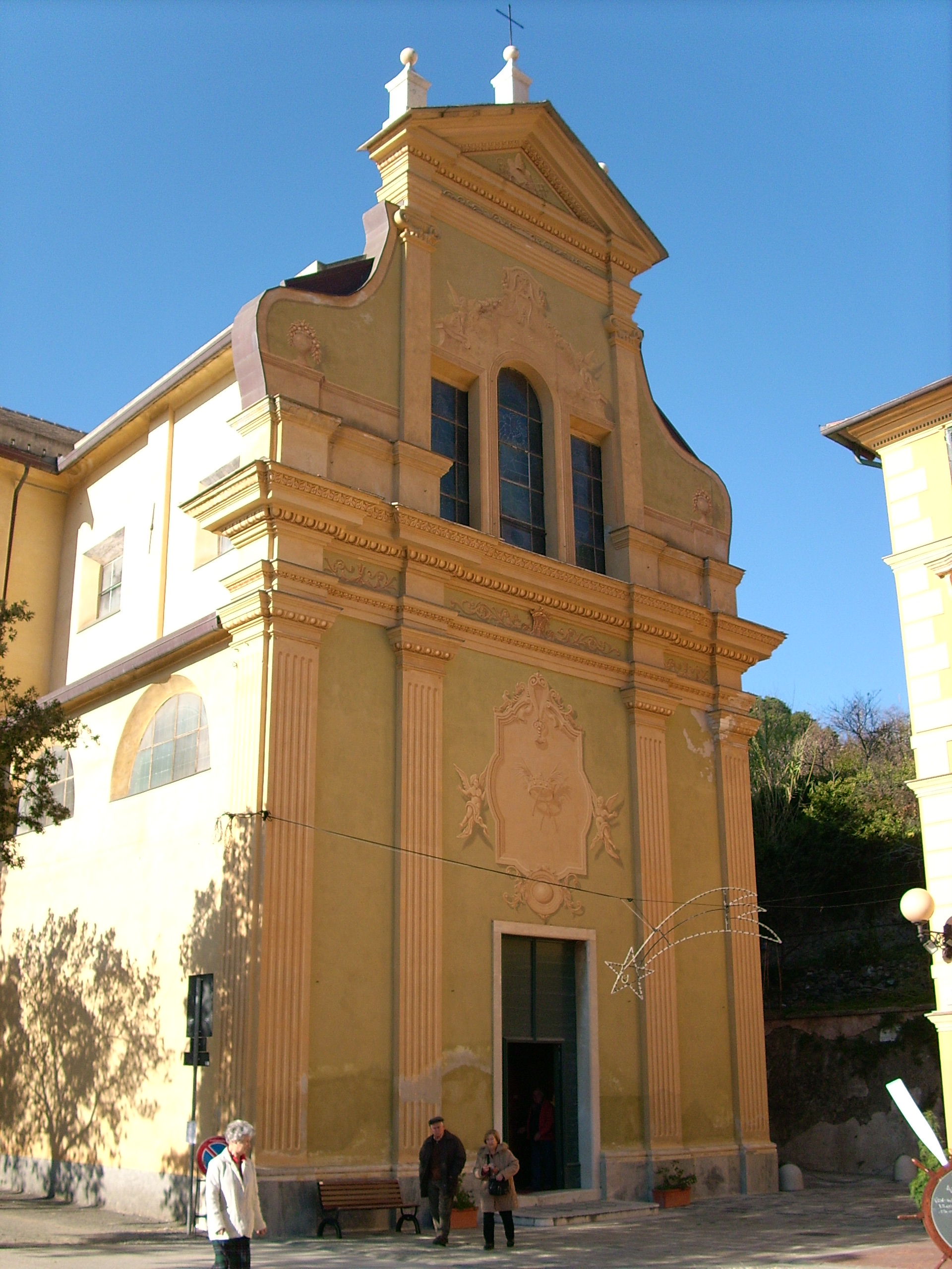 Chiesa di Santa Caterina presso Bonassola, Liguria, Italia